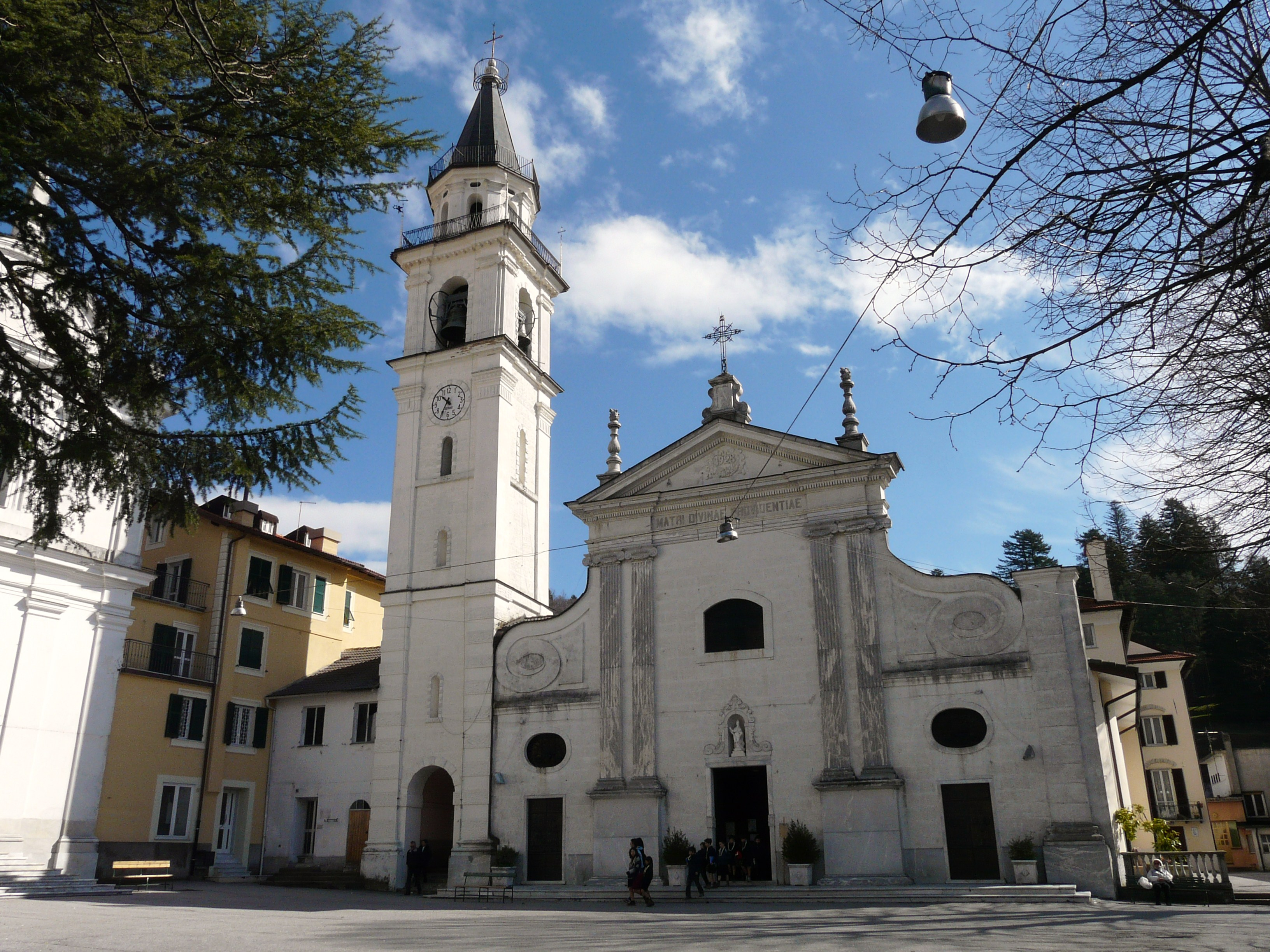 Chiesa di Sant'Onorato di Arles, Torriglia, Liguria, Italia